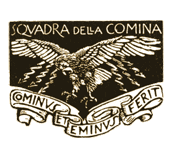 Motto coniato da Gabriele D'Annunzio (Pescara, 12 marzo 1863 – Gardone Riviera, 1º marzo 1938) per la Squadra della Comina, squadriglia di aviatori destinati ad imprese particolarmente pericolose. Disegno di Adolfo De Carolis (Montefiore dell'Aso, 6 gennaio 1874 – Roma, 7 febbraio 1928).